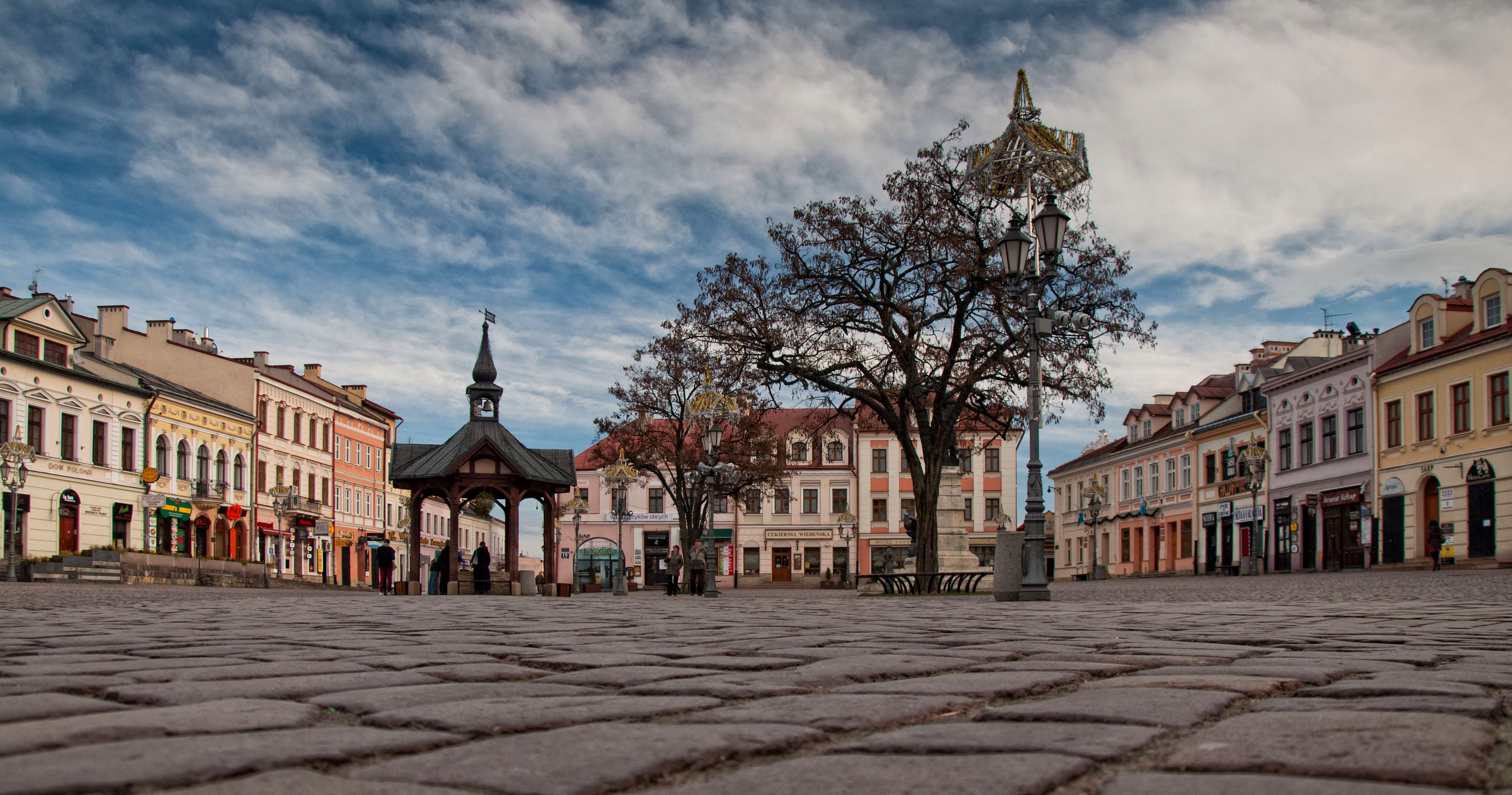 Rzeszów, zespół urbanistyczny średniowiecznego miasta i nowego miasta, 1354, XVIII, XX